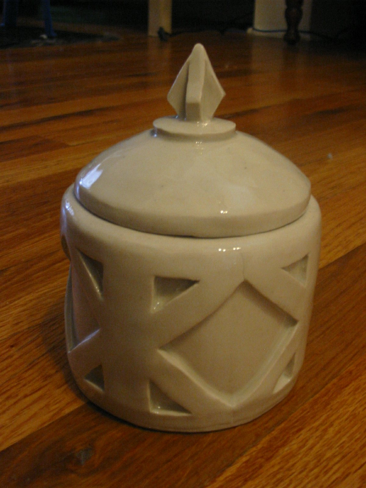 Ceramic container